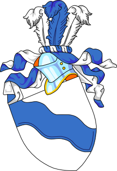 Erb Pětipeských z Chyš a Egrberka